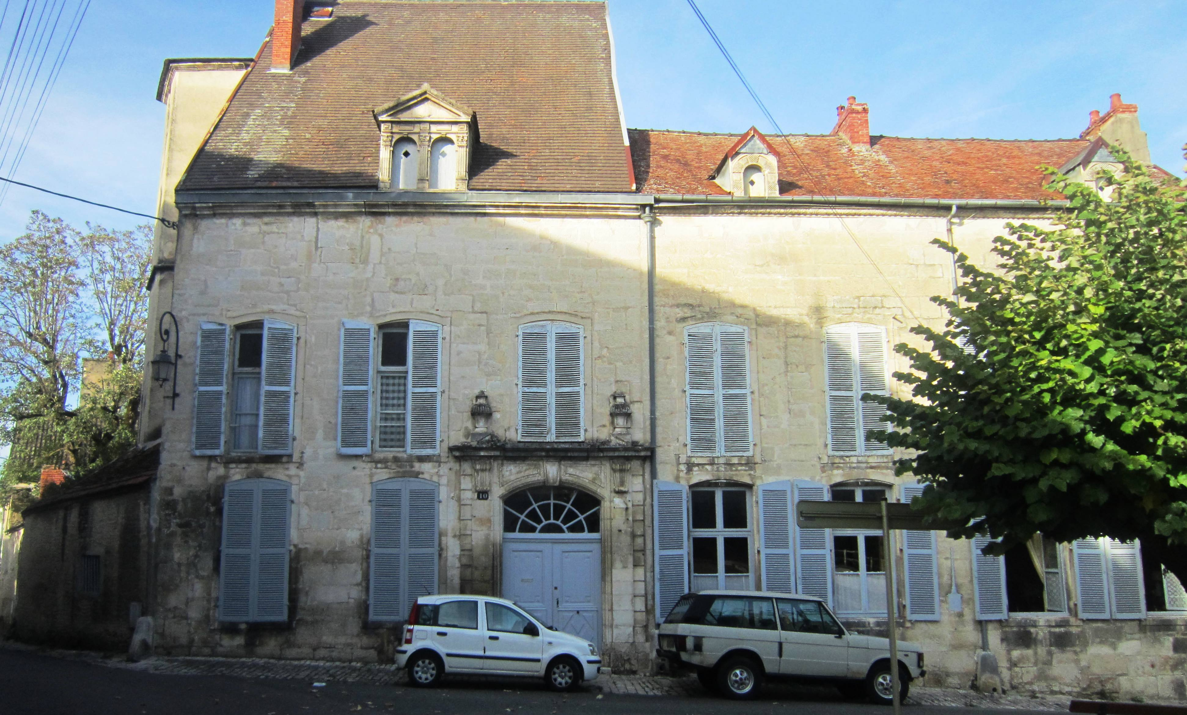 Maison de ville à Châtillon-sur-Seine, rue des Avocats